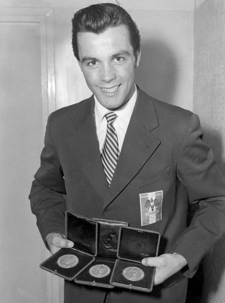 Toni Sailer with 3 gold olympic medals at Cortina 1956